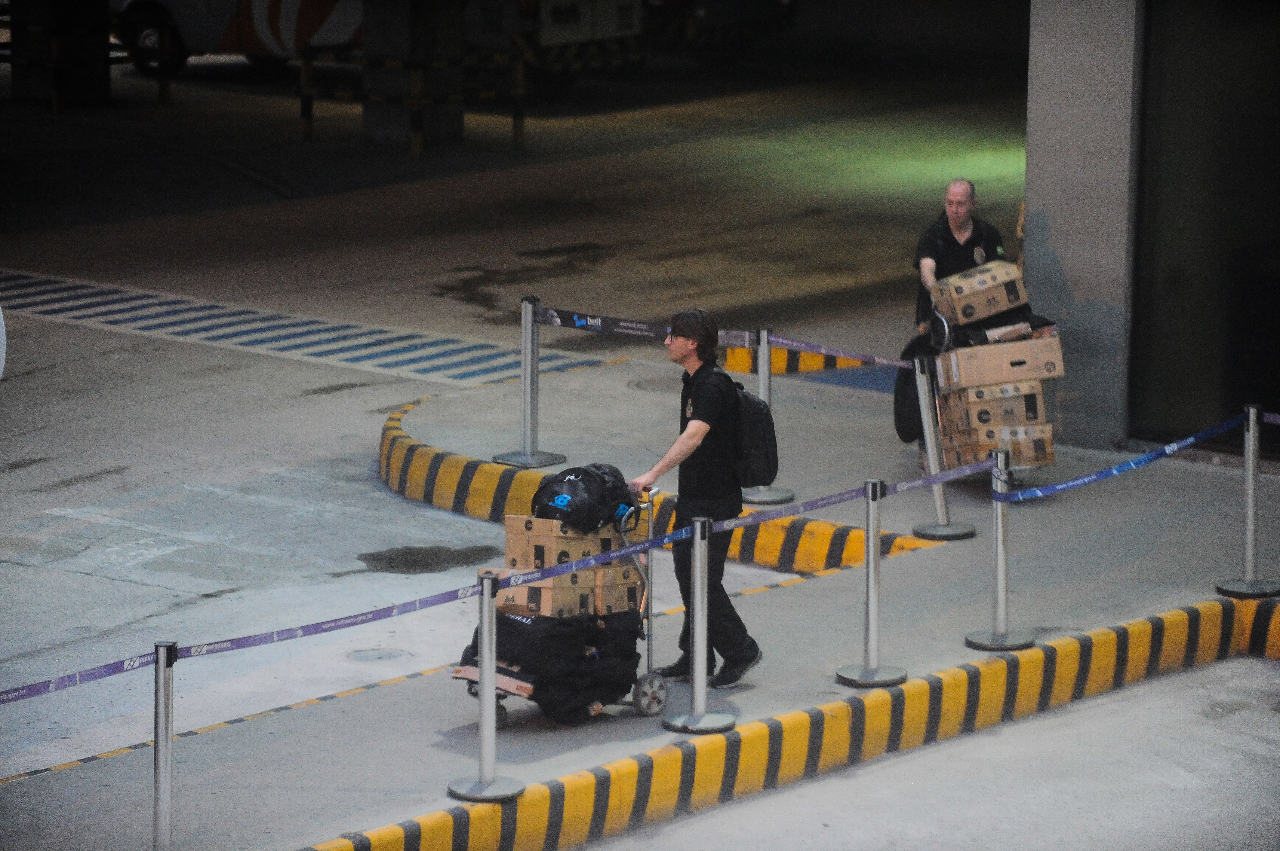 Policiais federais embarcam material apreendido na Eletronuclear, na Operação Radioatividade, 16ª fase da Operação Lava Jato.